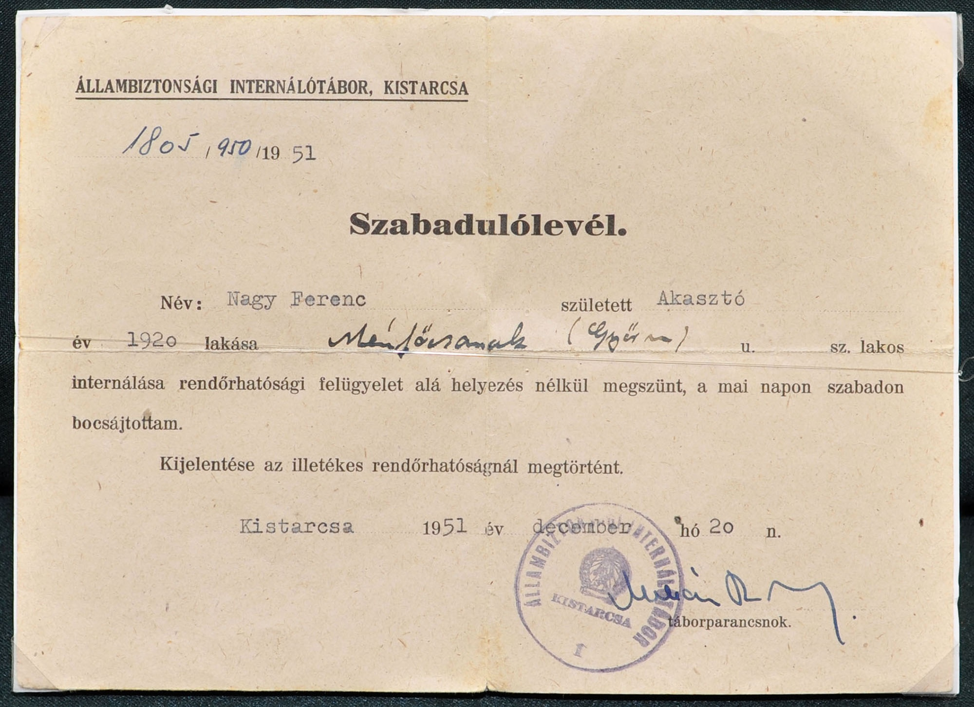 Nagy Ferenc szalézi szerzetes szabadulólevele a Kistarcsai Központi Internálótáborból